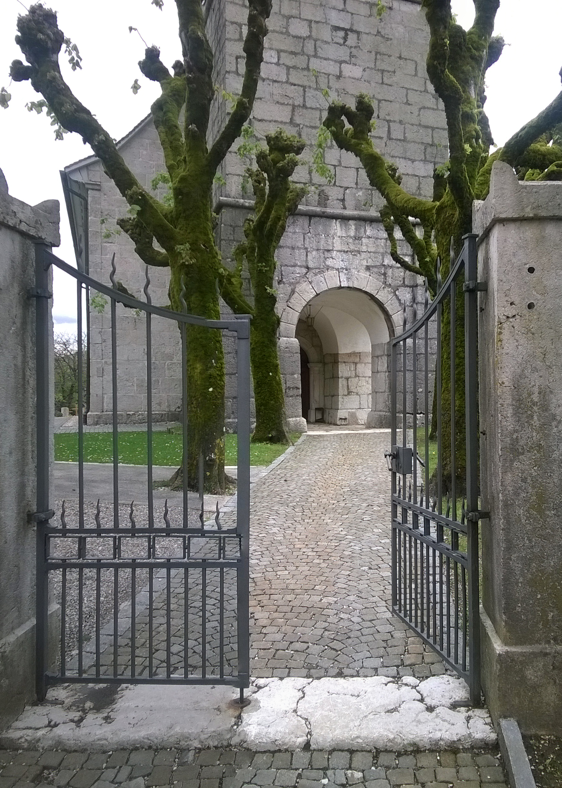 Reformierte Kirche, Orvin, Kanton Bern. Eingangstor, nach Osten.